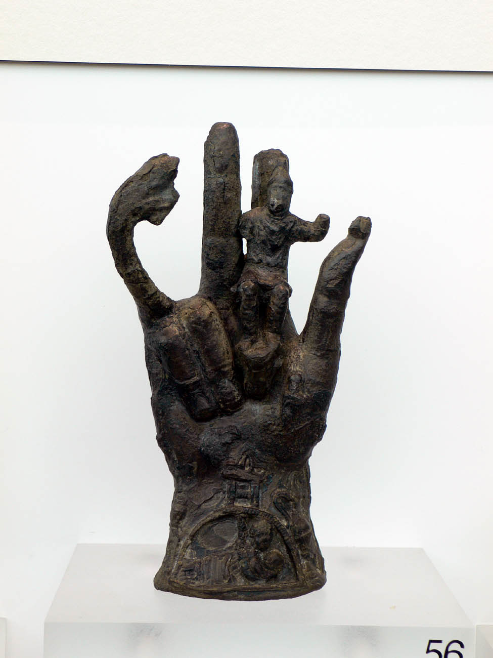 Mano Sabazia encontrada en los fondos de Escombreras (Cartagena). Museo Nacional de Arqueología Subacuática de Cartagena.